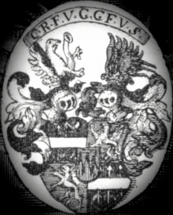 Wappen derer (Linsmaier/Linnsmaier/Linsmayr/Linsmeyr) von Greiffenberg, Freiherren zu Seyssenegg (seit 1569 im Besitz von Schloss und Herrschaft Seisenegg, 1579 geadelt, 1608 Freiherrenstand)